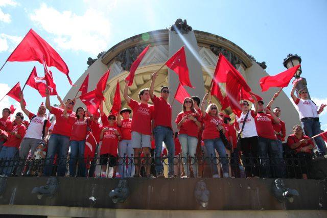 Jóvenes del ML en San José, Costa Rica